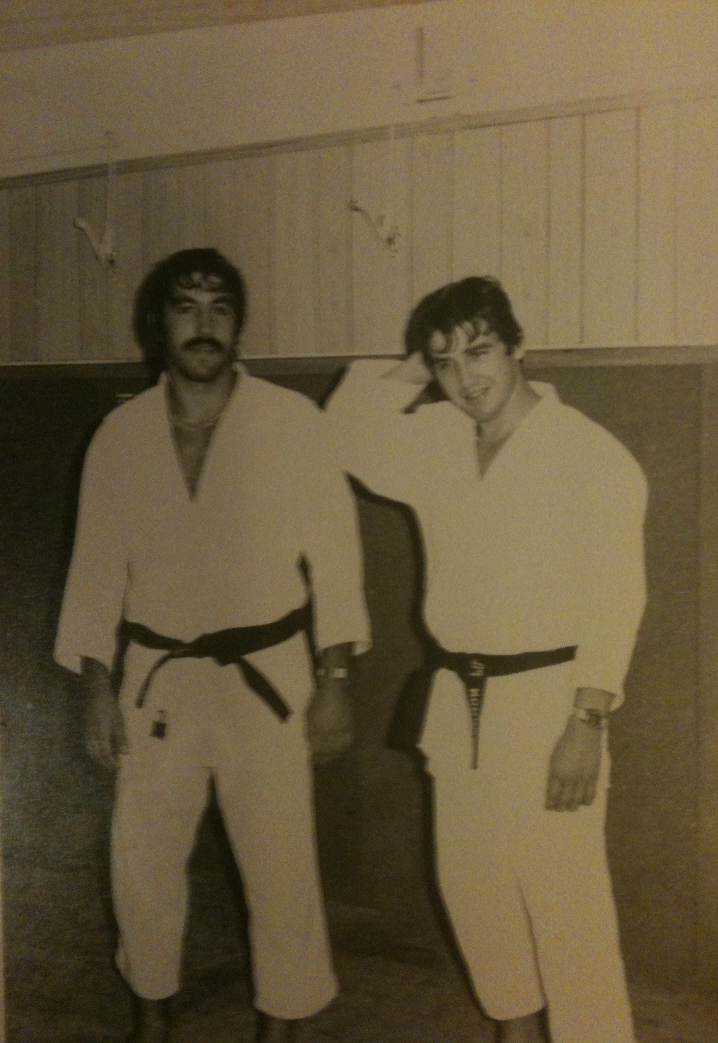 De Gauche à droite, Vachon R. et Vachon P.